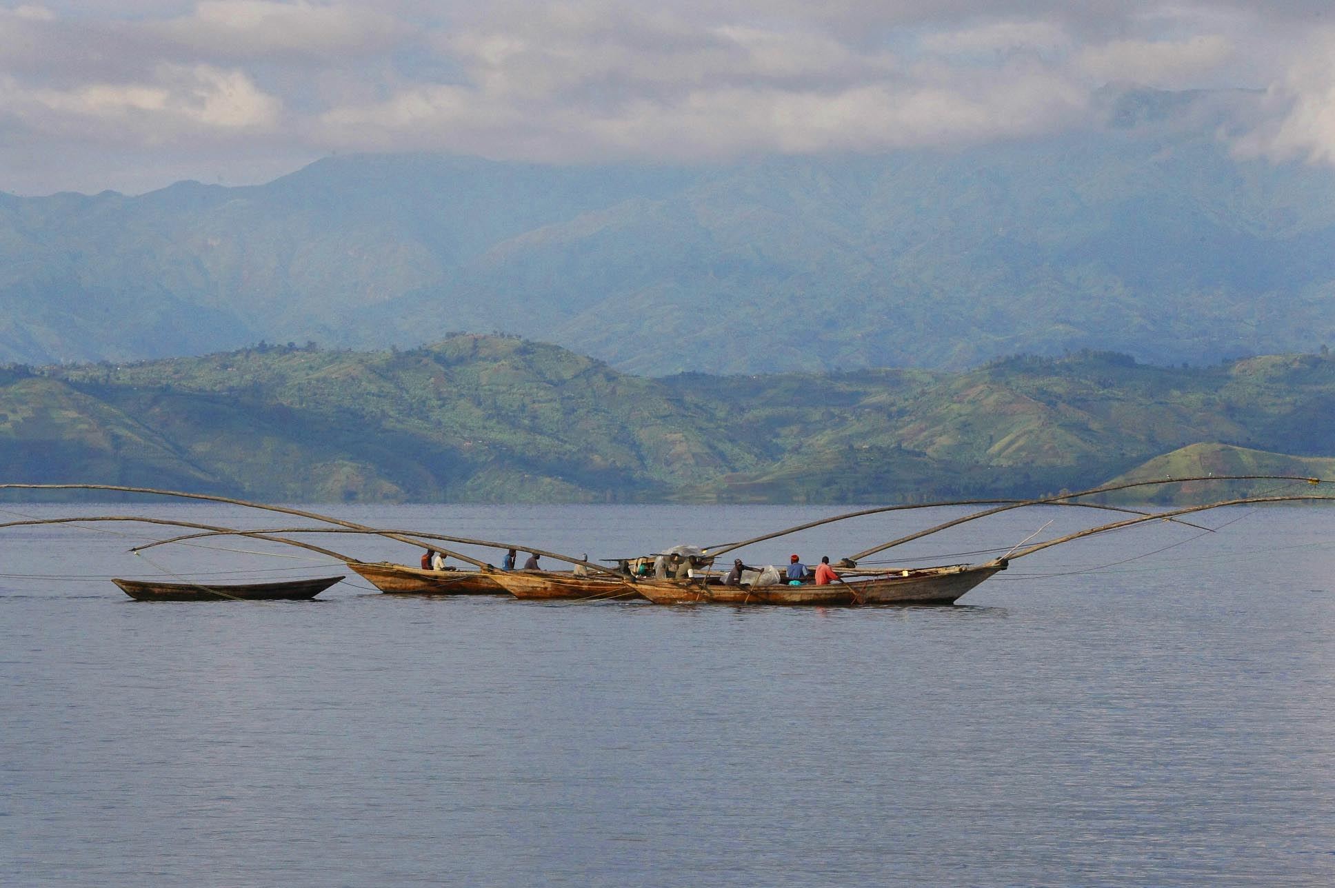 Congo: Lake Kivu